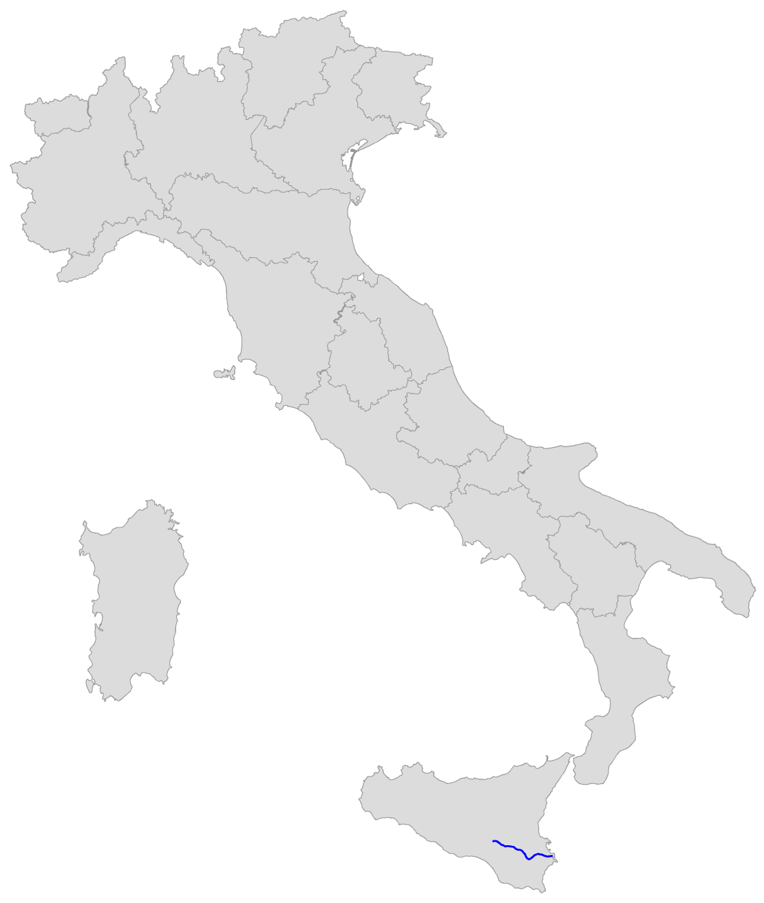 Percorso della SS 124 Siracusana